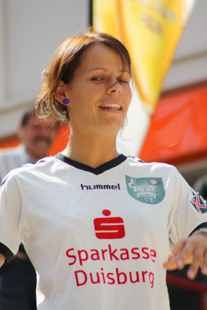 Jennifer Oster, Duisburg, FCR 2001 Duisburg